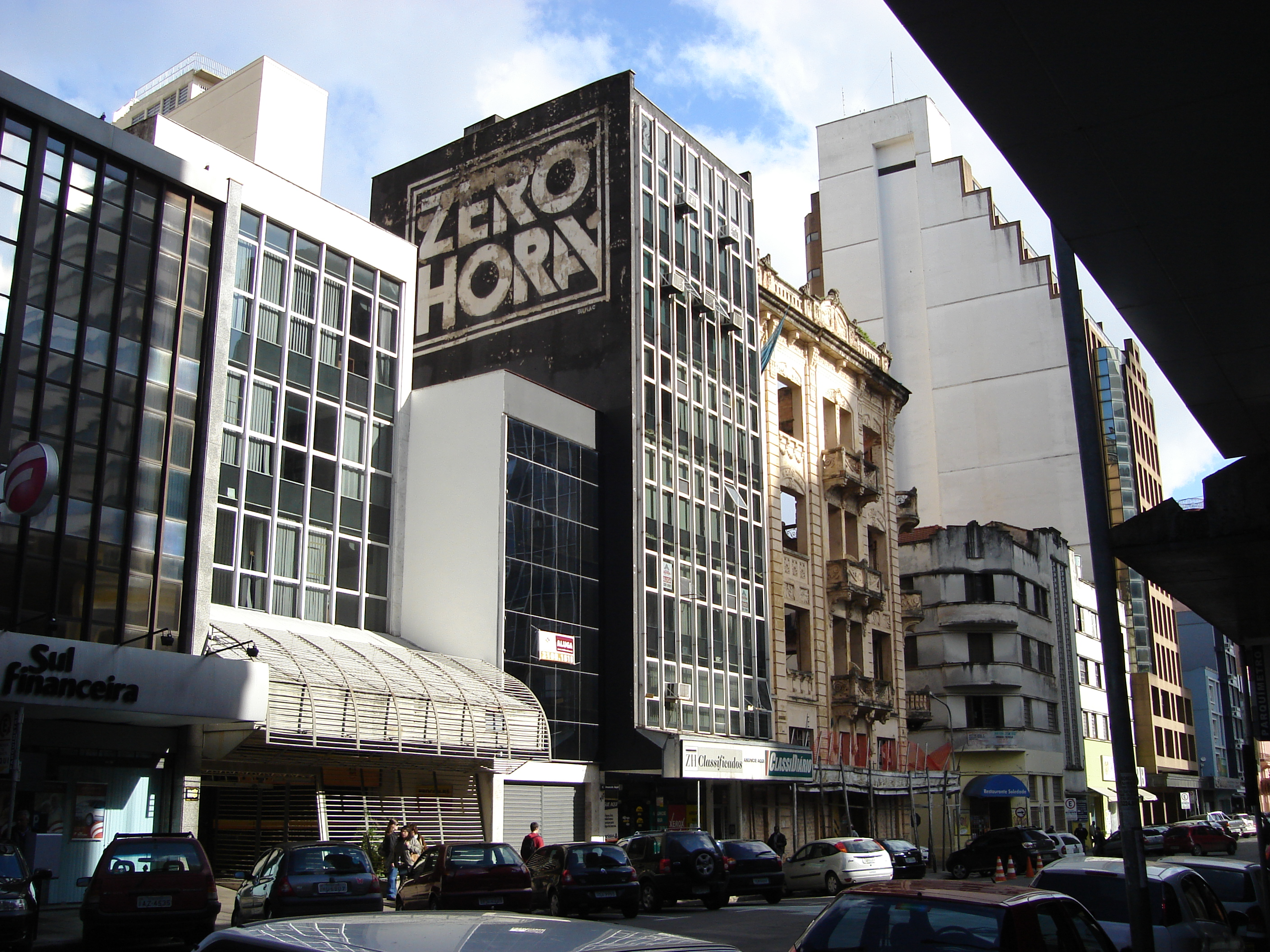 Antiga sede da Zero Hora, na rua Sete de Setembro, onde passou a funcionar o ZH Classificados e o Classidiário.